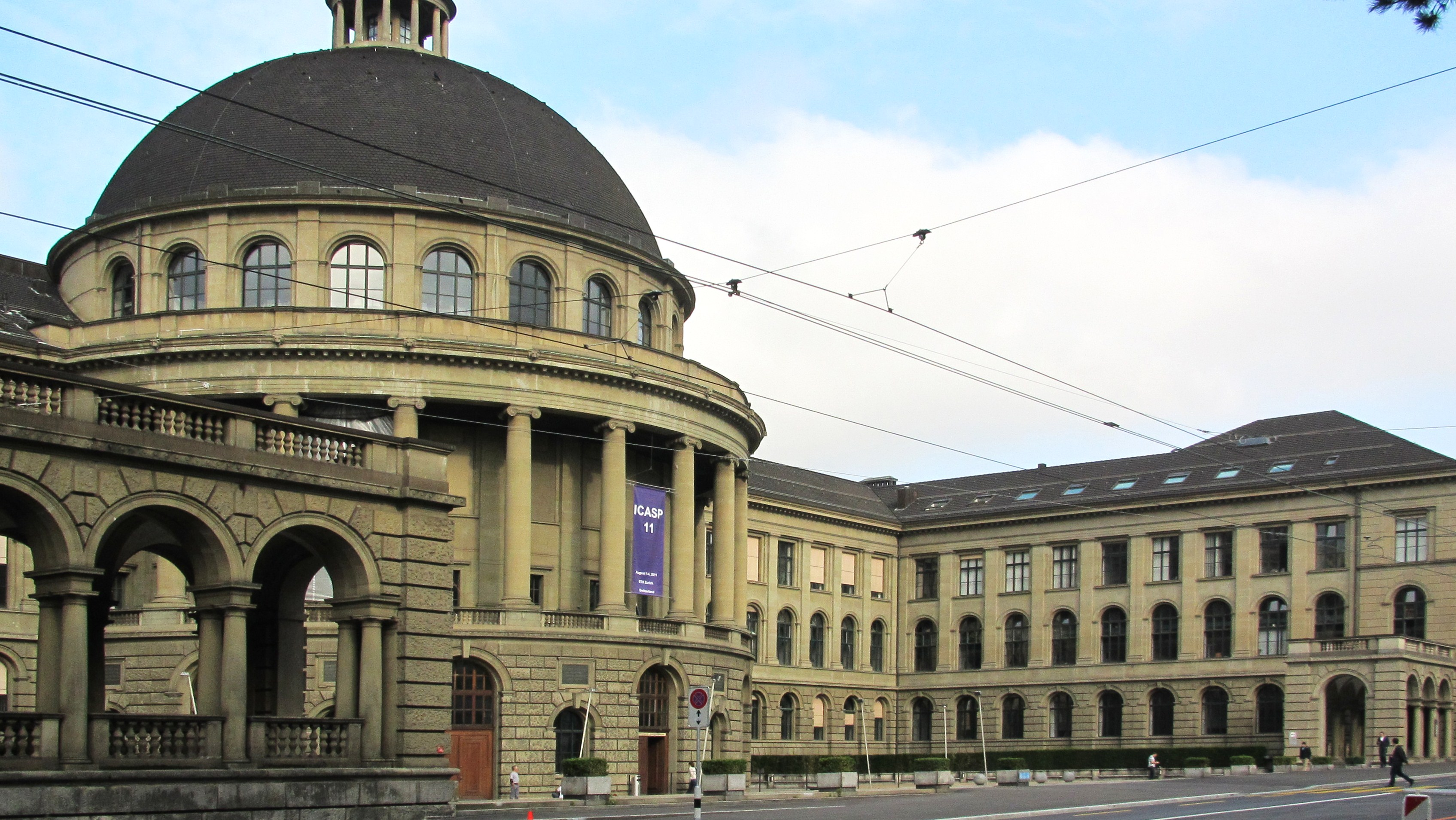 Zürich,ETH Hauptgebäude, Rämistrasswe 101